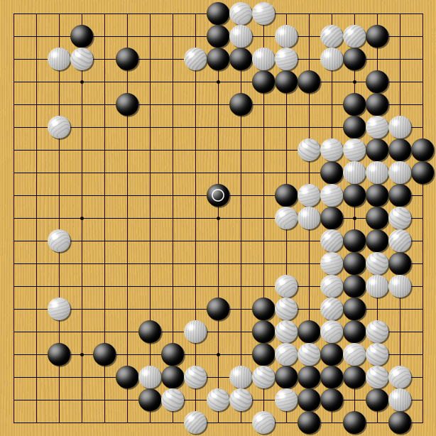 Kendi çalışmam.